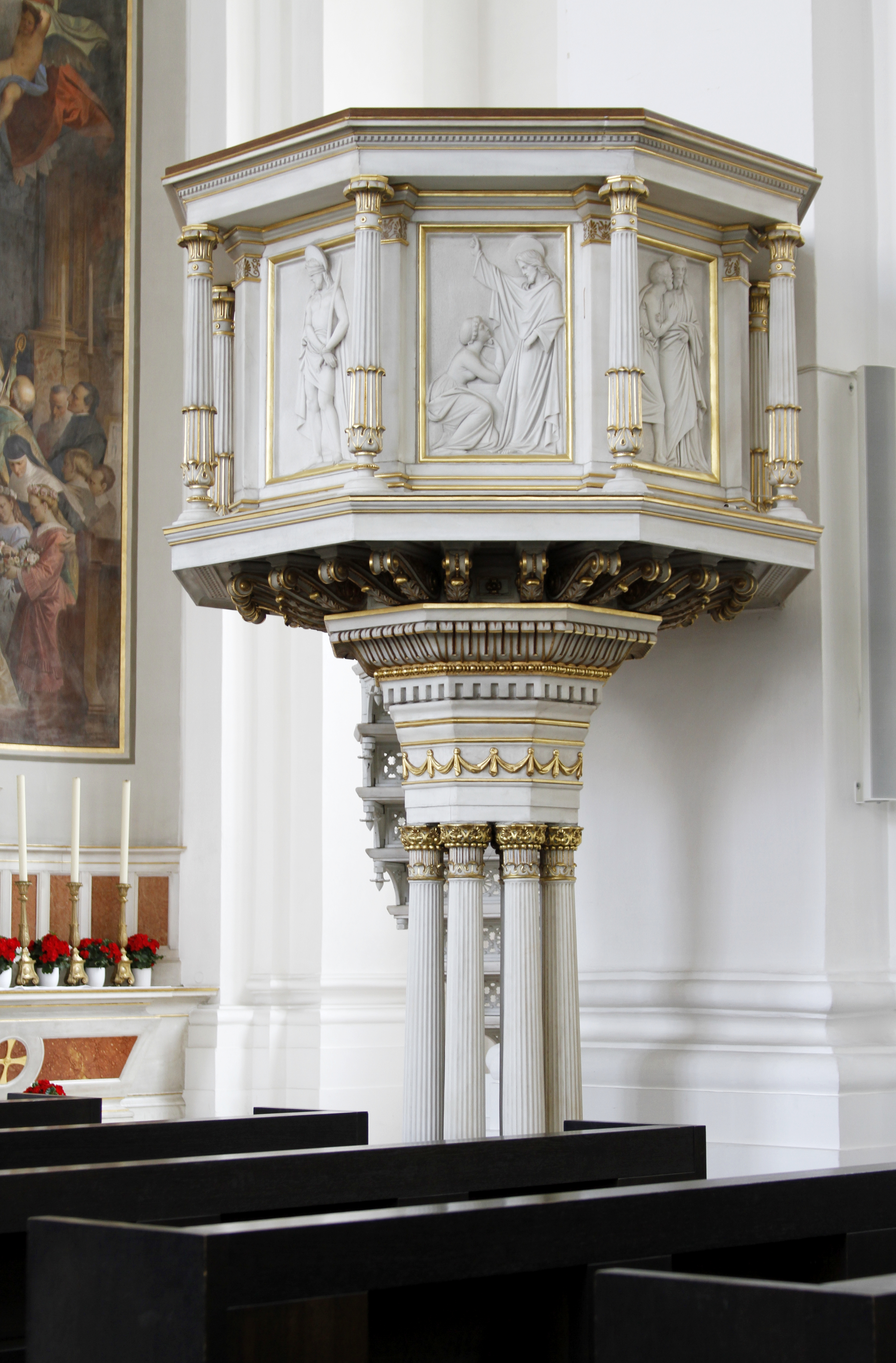 Jesuitenkirche - Heidelberg - Germany